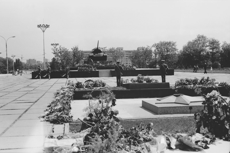 Memorial complex.